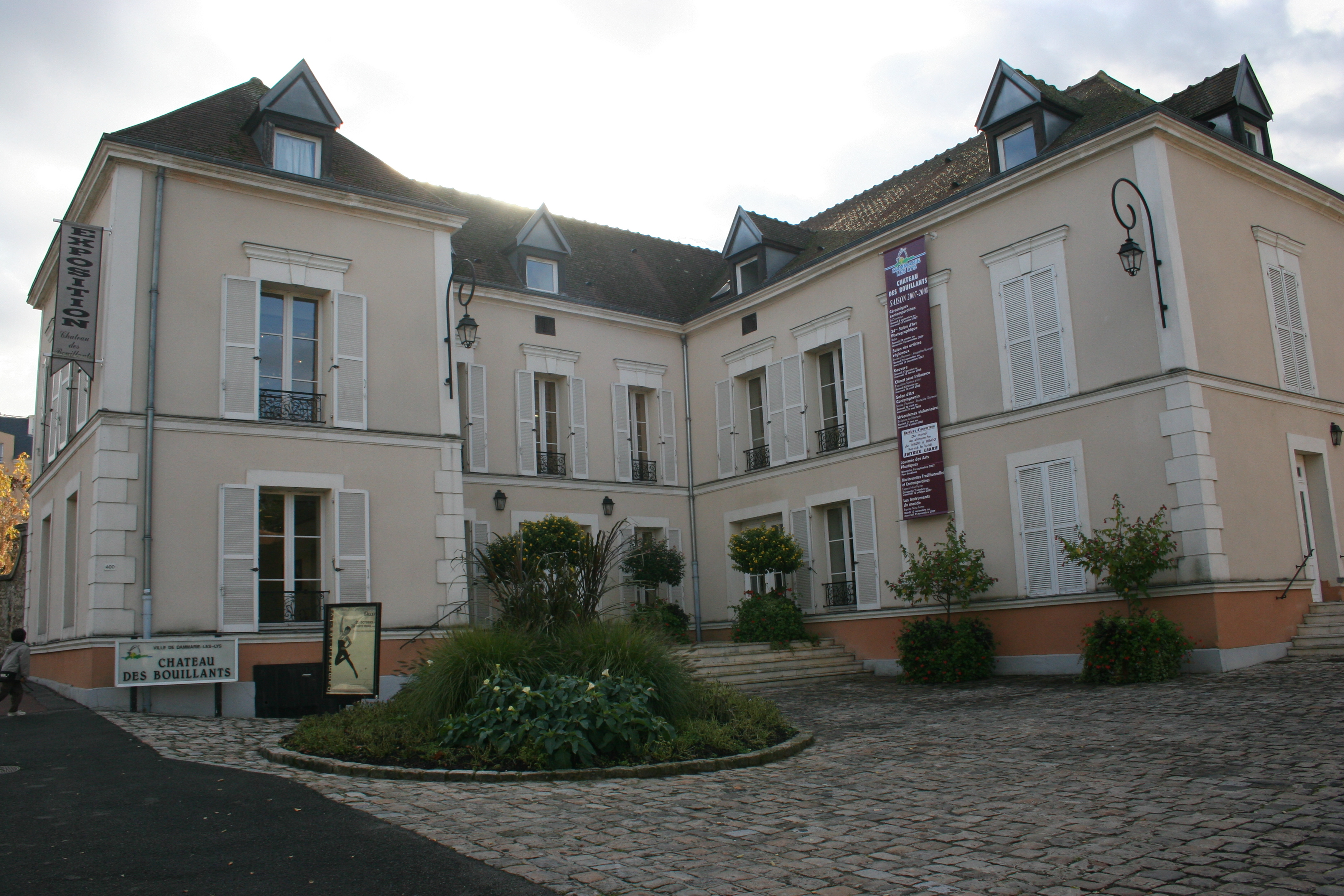 Chateau des Bouillants - Dammarie-Lès-Lys